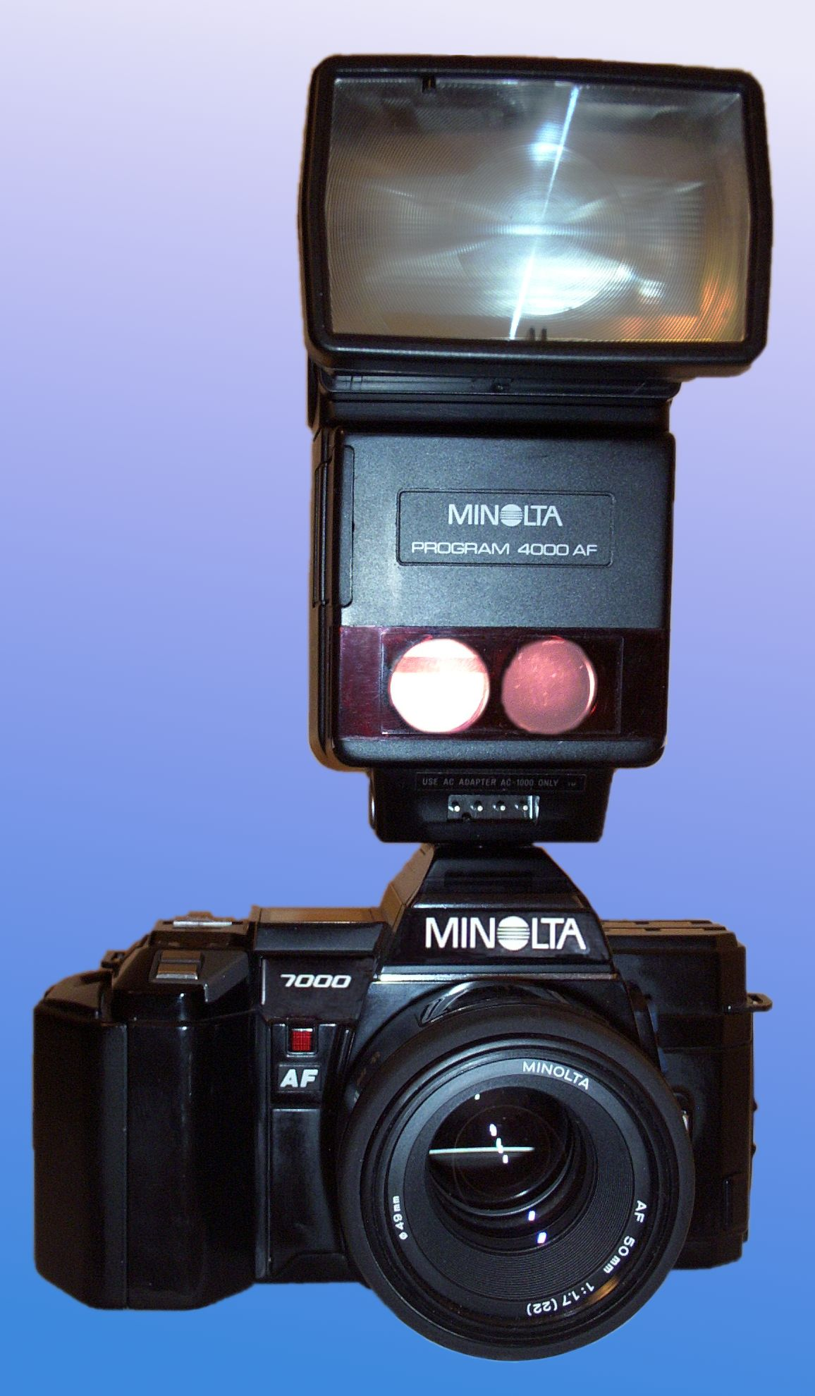 Bildbeschreibung: AF-Beleuchtung in Betrieb Quelle: selbst photographiert Fotograf/Zeichner: Montauk Datum: 5. Maerz. 2006 Sonstiges: Die Projektion der ueberlagerten Lichtkegel der beiden Leuchten ist in Bild:AF-Hilfslicht.jpg zu sehen